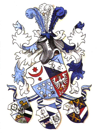 oben rechts: Stadtwappen von Halle (Saale), oben links: Farben und Zirkel des Corps Saxonia Konstanz, unten rechts: gekreuzte Korb- und Glockenschläger mit sechs Sternen für die sechs Gründercorps, unten links: Stadtwappen Frankfurt (Main); darunter schließen sich die Wappen der Gründercorps Neoborussia, Saxonia und Teutonia an